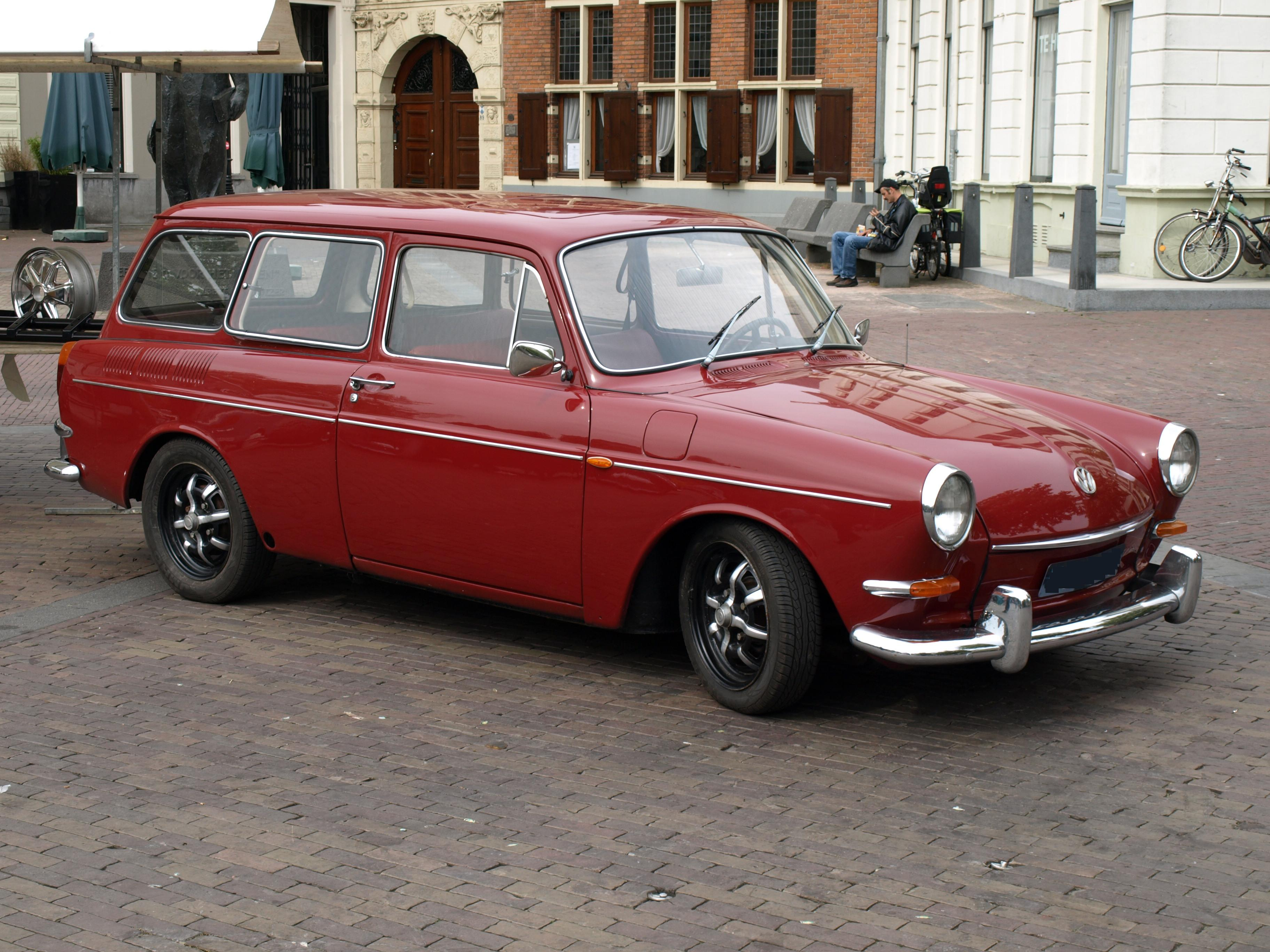 Aircooled Chillout Day 2009 - Deventer 1965 Volkswagen Type 3 /365